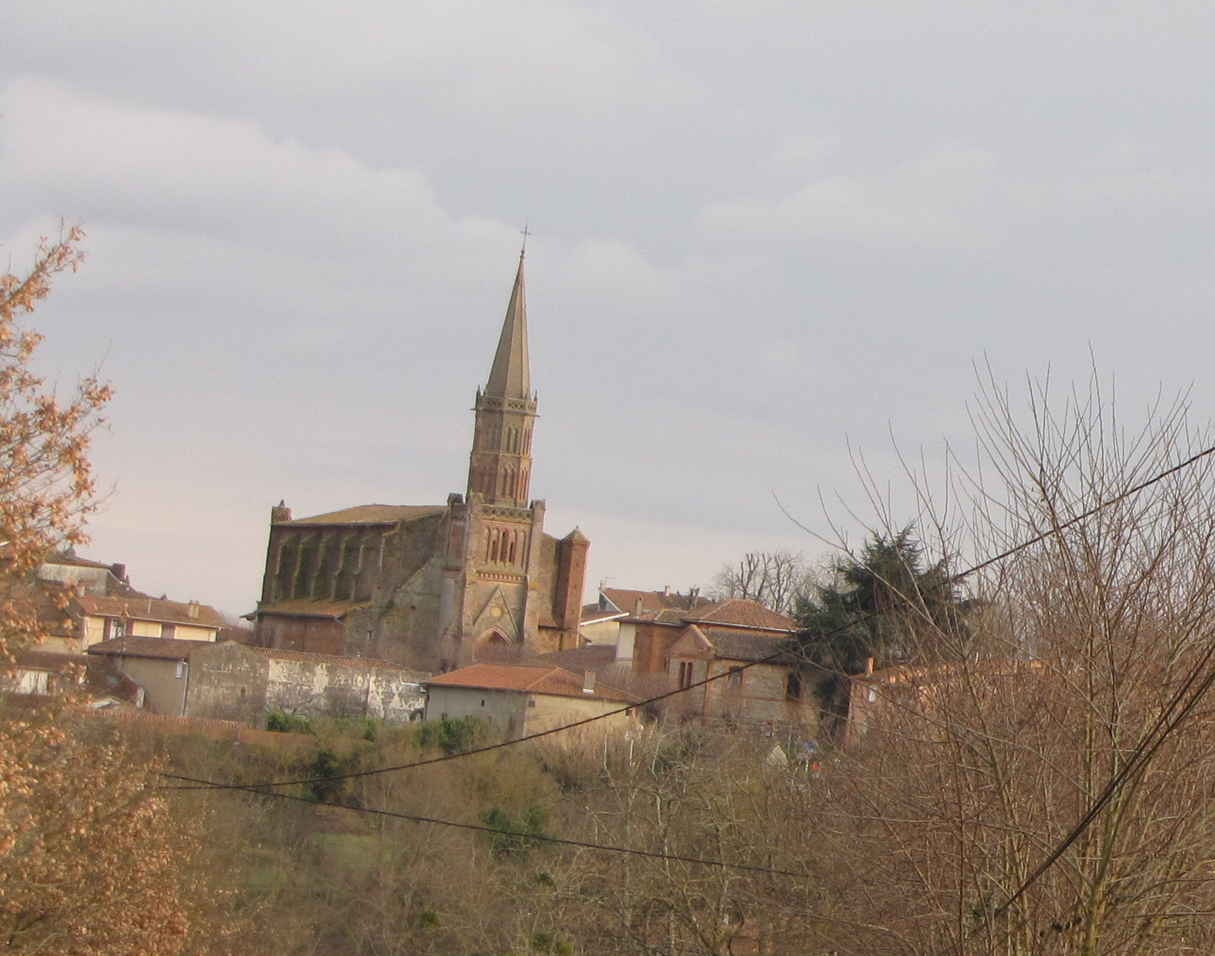 Le Fousseret